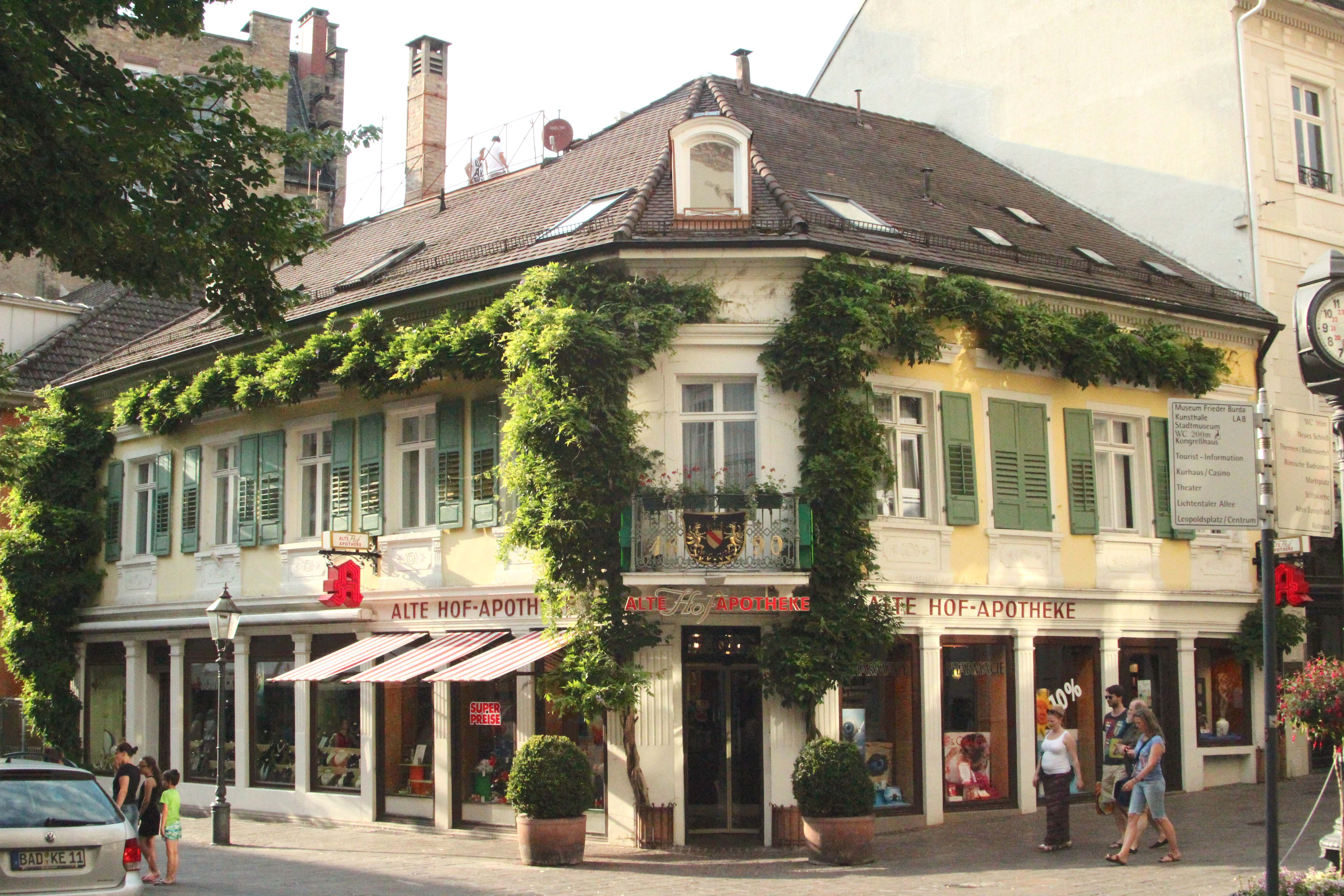 Bildinhalt: Die Alte Hofapotheke im Sommer Aufnahmeort: Baden-Baden, Deutschland